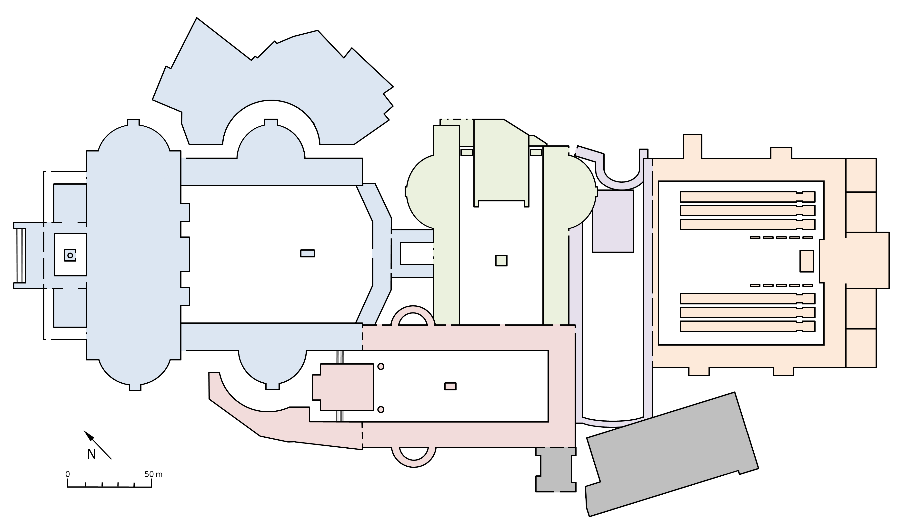 Plan des Forums impériaux.